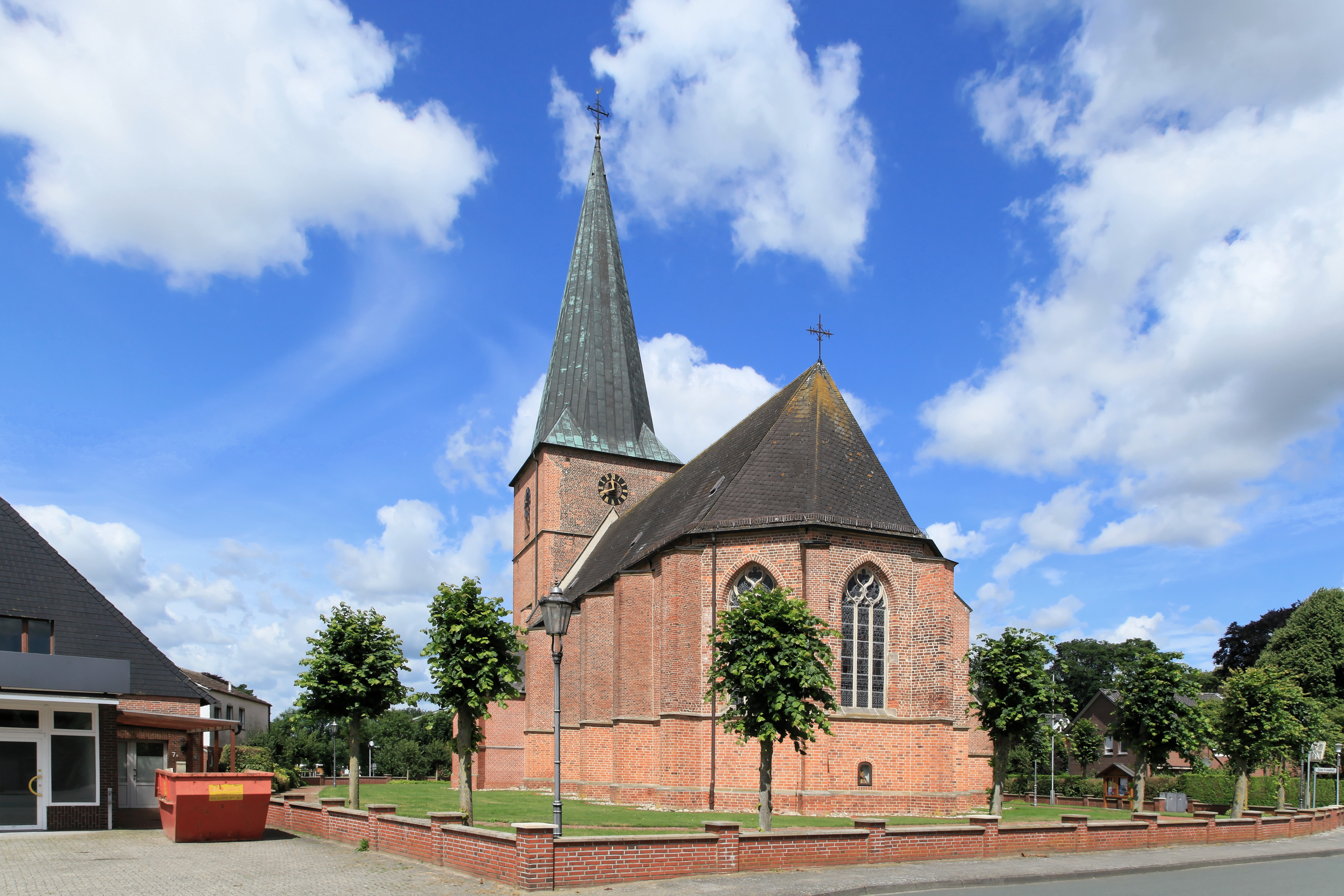 St.-Georg-Kirche, Kirchstraße in Steinbild, Kluse (Emsland)